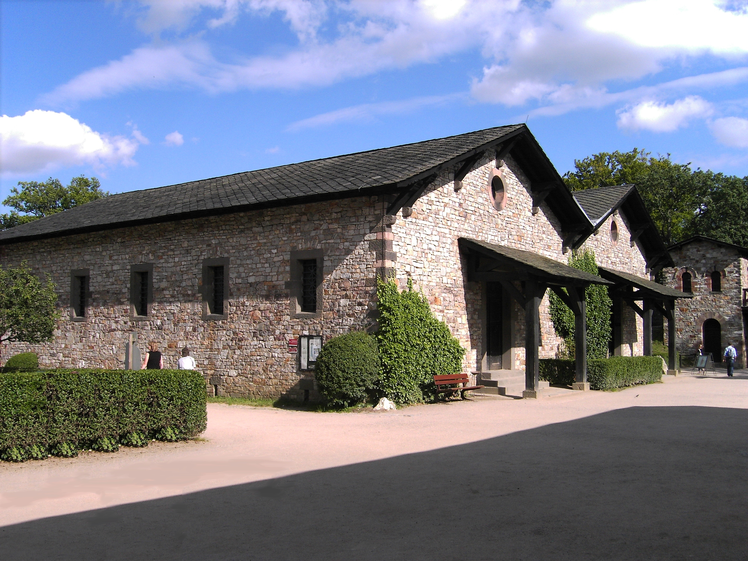 Horrea (Getreidespeicher) in der Saalburg (Rekonstruktion).